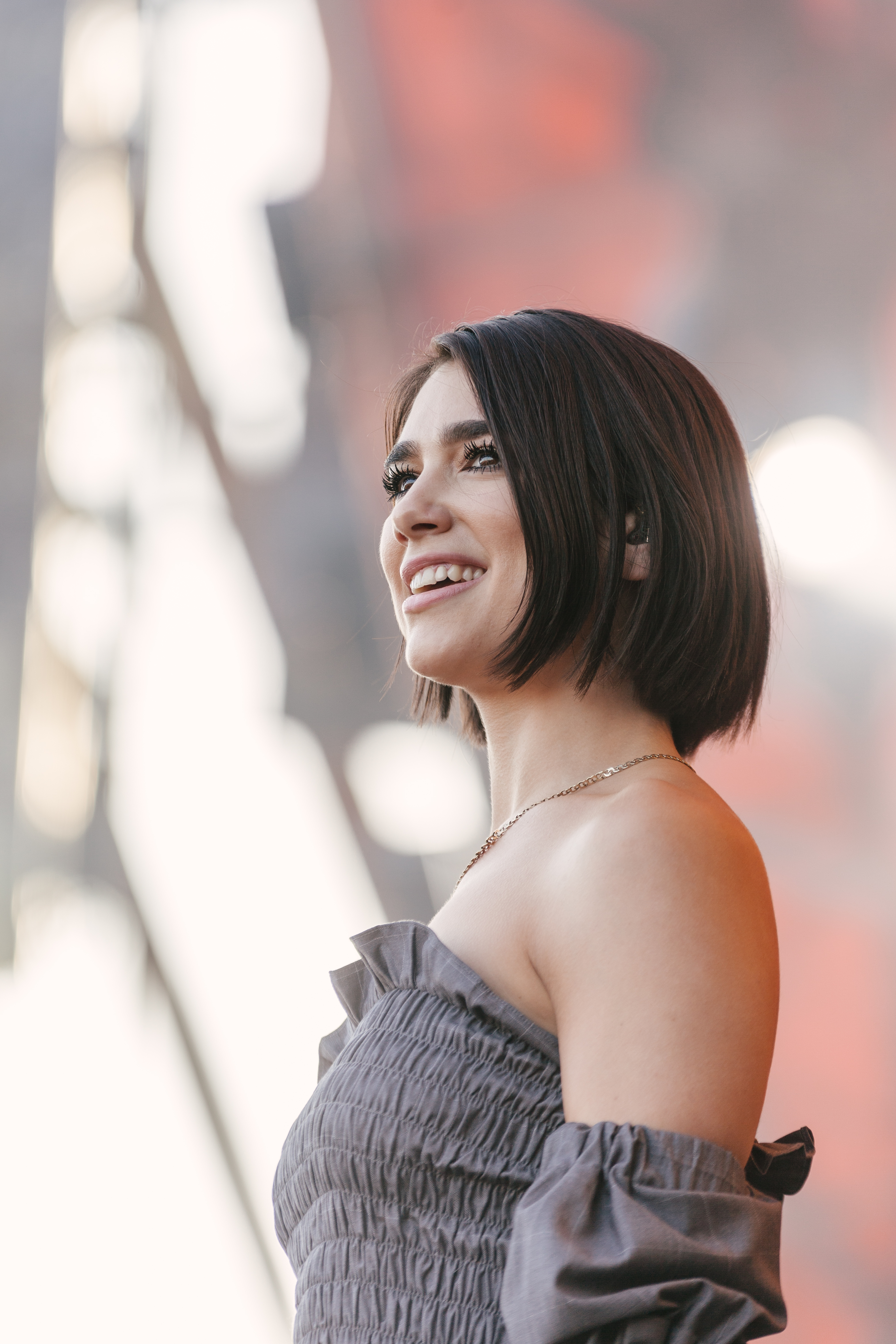 Festivalsommer This photo was created with the support of donations to Wikimedia Deutschland in the context of the CPB project "Festival Summer".